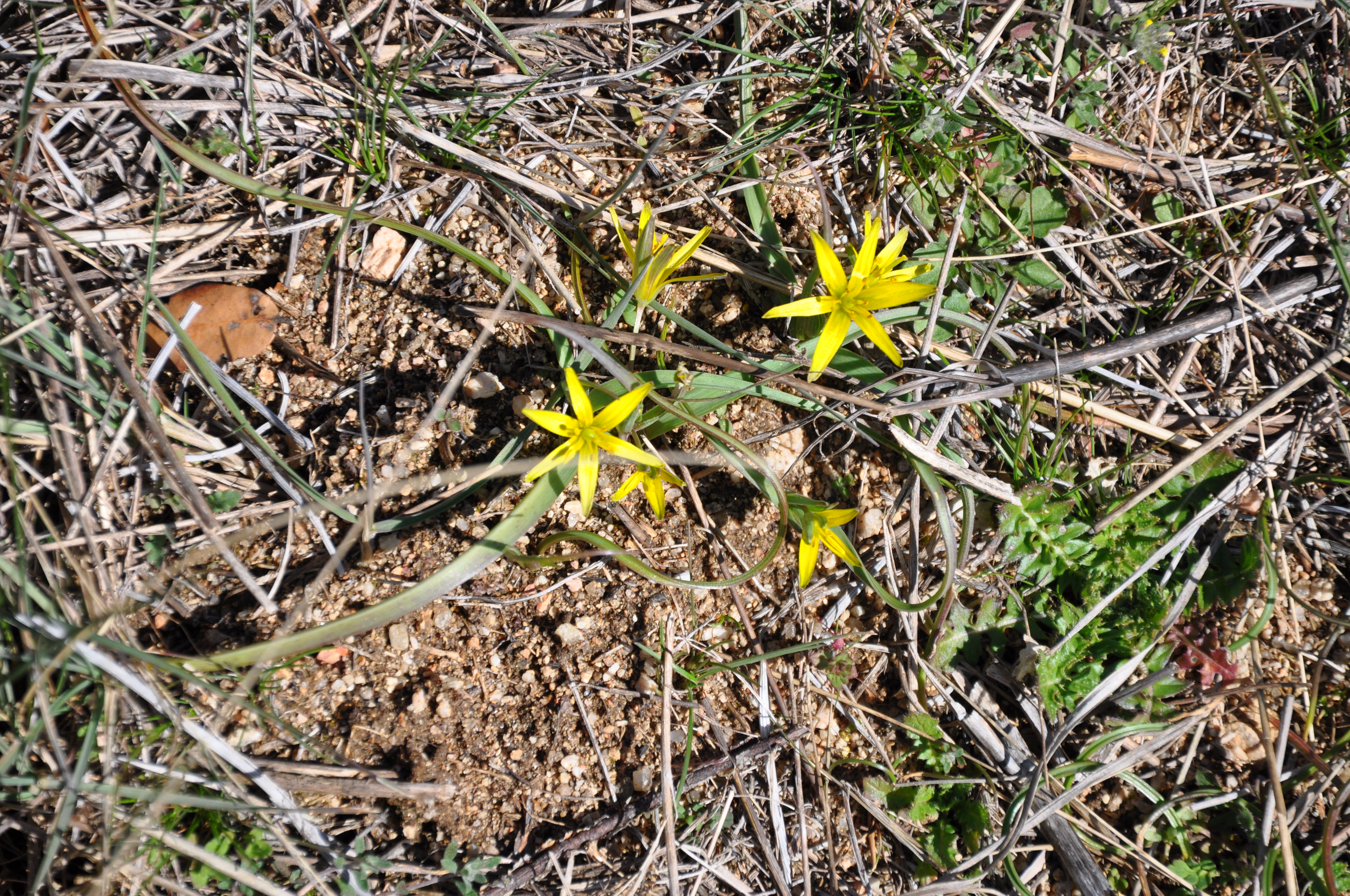 Estrella amarilla (Gagea foliosa). Guareña, Av, España